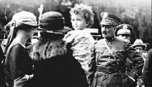 La familia García Granados intercediendo por el piloto coronel Miguel García Granados ante el presidente de facto de Guatemala José María Orellana.